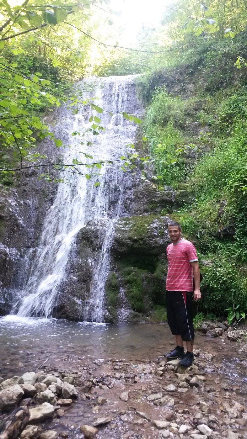 Srpskohrvatski / српскохрватски: Vodopad Skakavac.